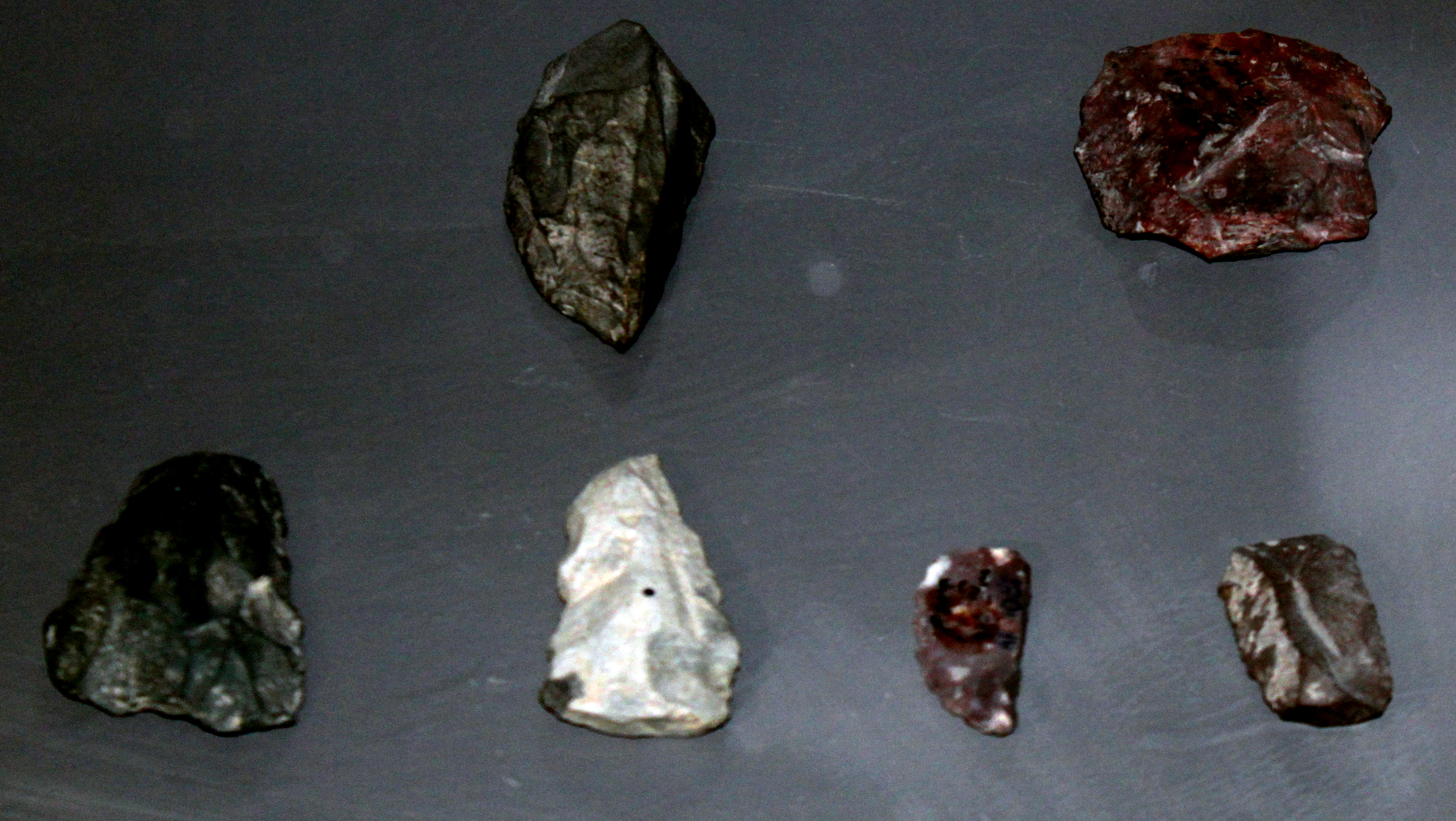 Çaydaşı və çaxmaqdaşından əmək alətləri, III təbəqə, 150-200 min il əvvəl.